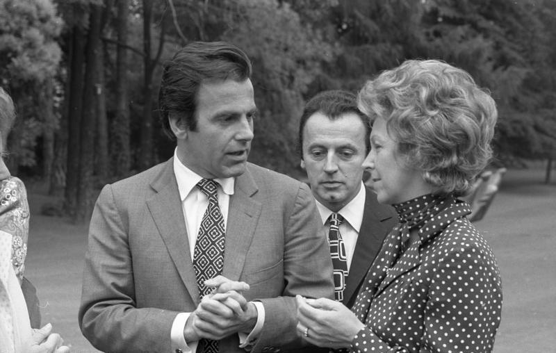 Bundeskanzler Willy Brandt empfängt Filmschauspieler Information added by Wikimedia users.Ergänzung: links Maximilian Schell